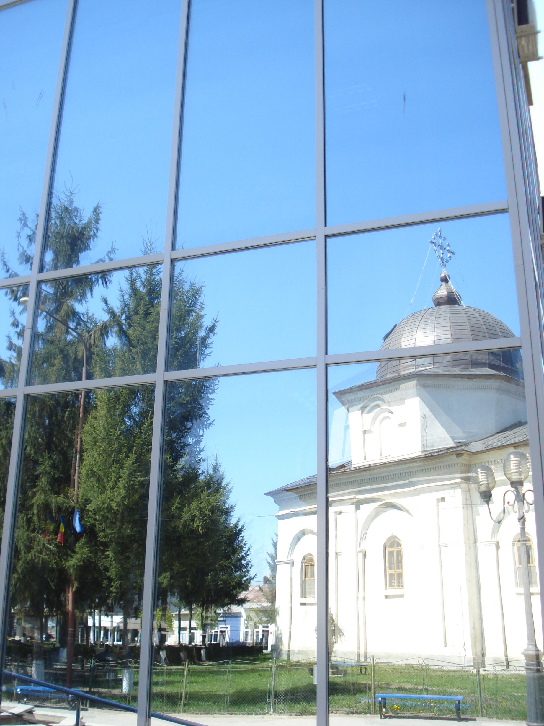 Biserica Sfântul Nicolae din Darabani (oglindită într-o construcţie nouă). 01